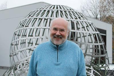 Foto di Detlef Dürr